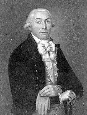 Friedrich Philipp Stumm (1751-1836), montanindustrieller Unternehmer